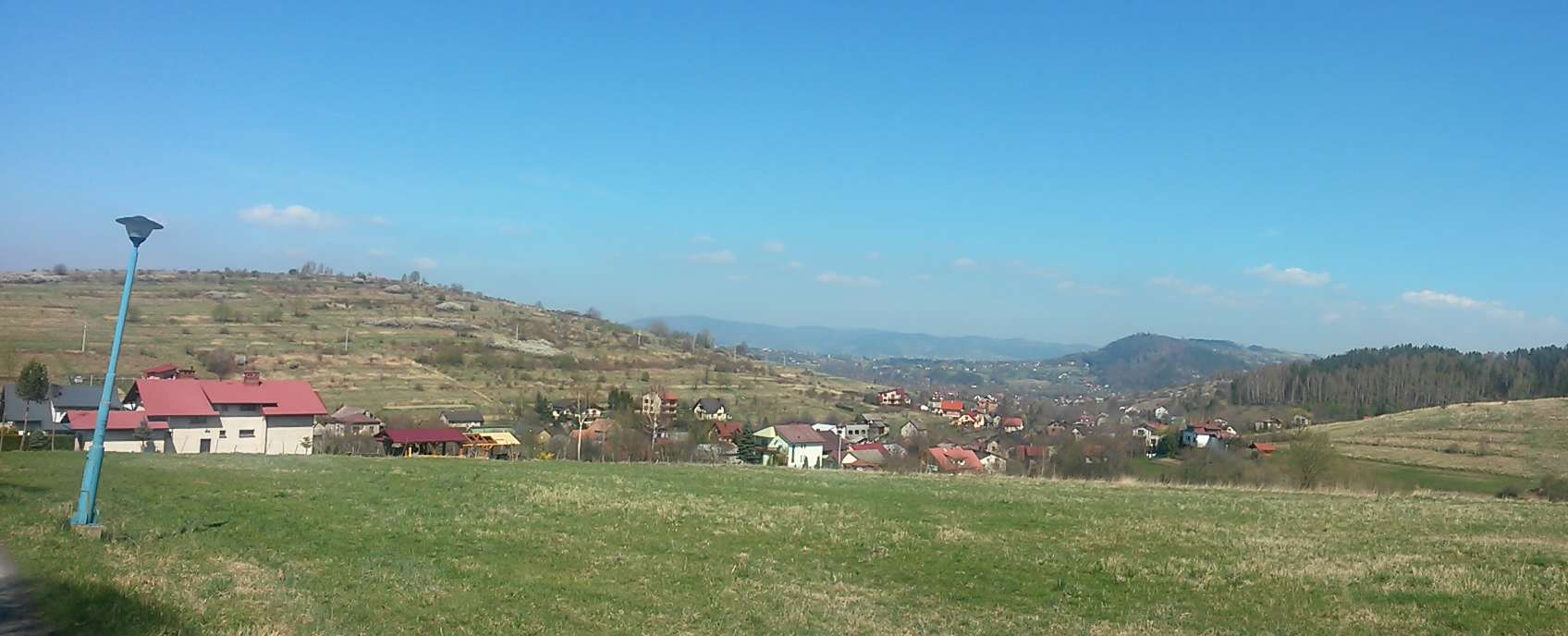 panorama Trzebinia